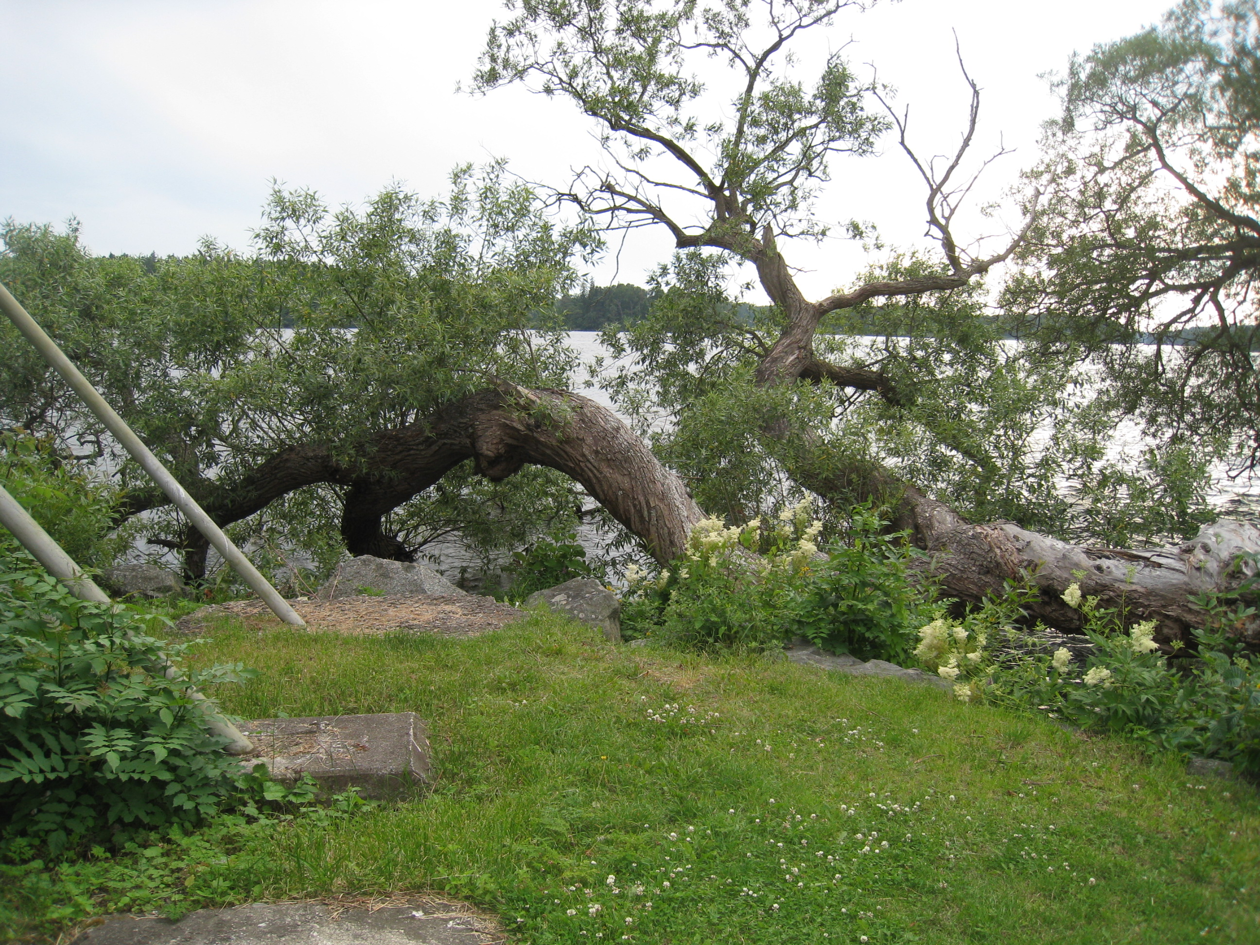 Ålstensängens natur i stadsdelen Ålsten i södra Bromma väster om Stockholm. Vid Ålstensängen, nära Ålstensparken, växer en fantastiskt formad knäckepil, som lutar över vattnet vid Mälaren.